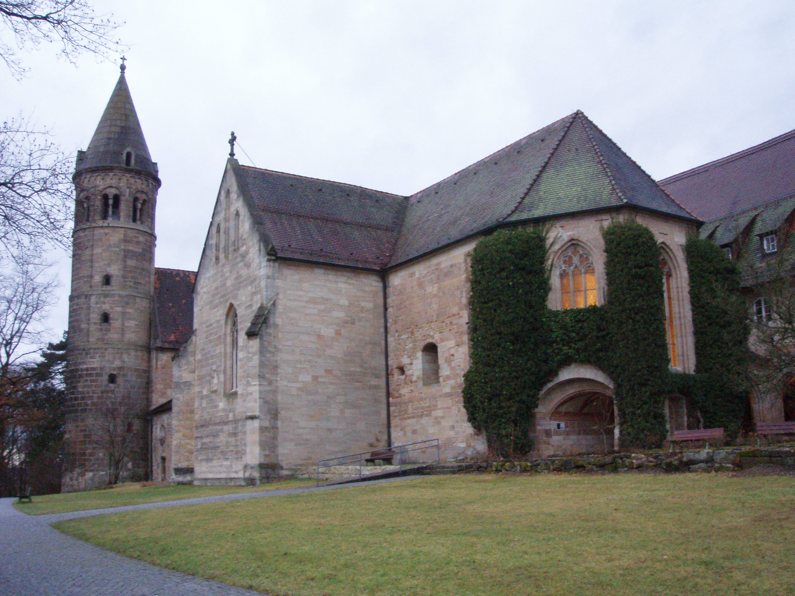 Klosterkirche Lorch von außen